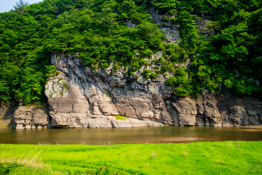 울주 대곡리 반구대 암각화